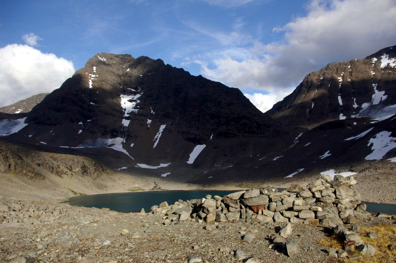 Gaskkasbákti (Kaskaspakte) from northwest.